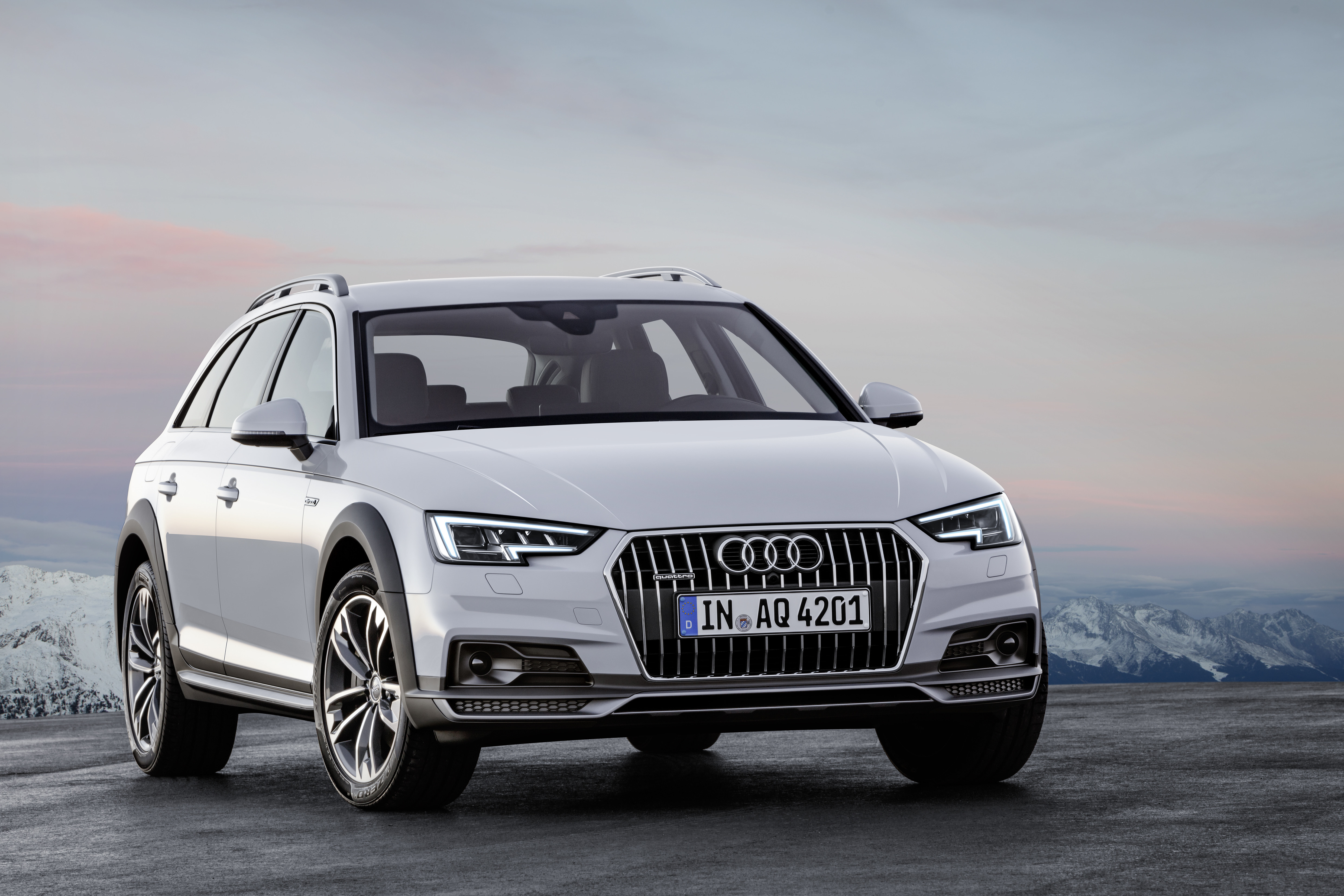 Farbe: Gletscherweiß Colour: Glacier White